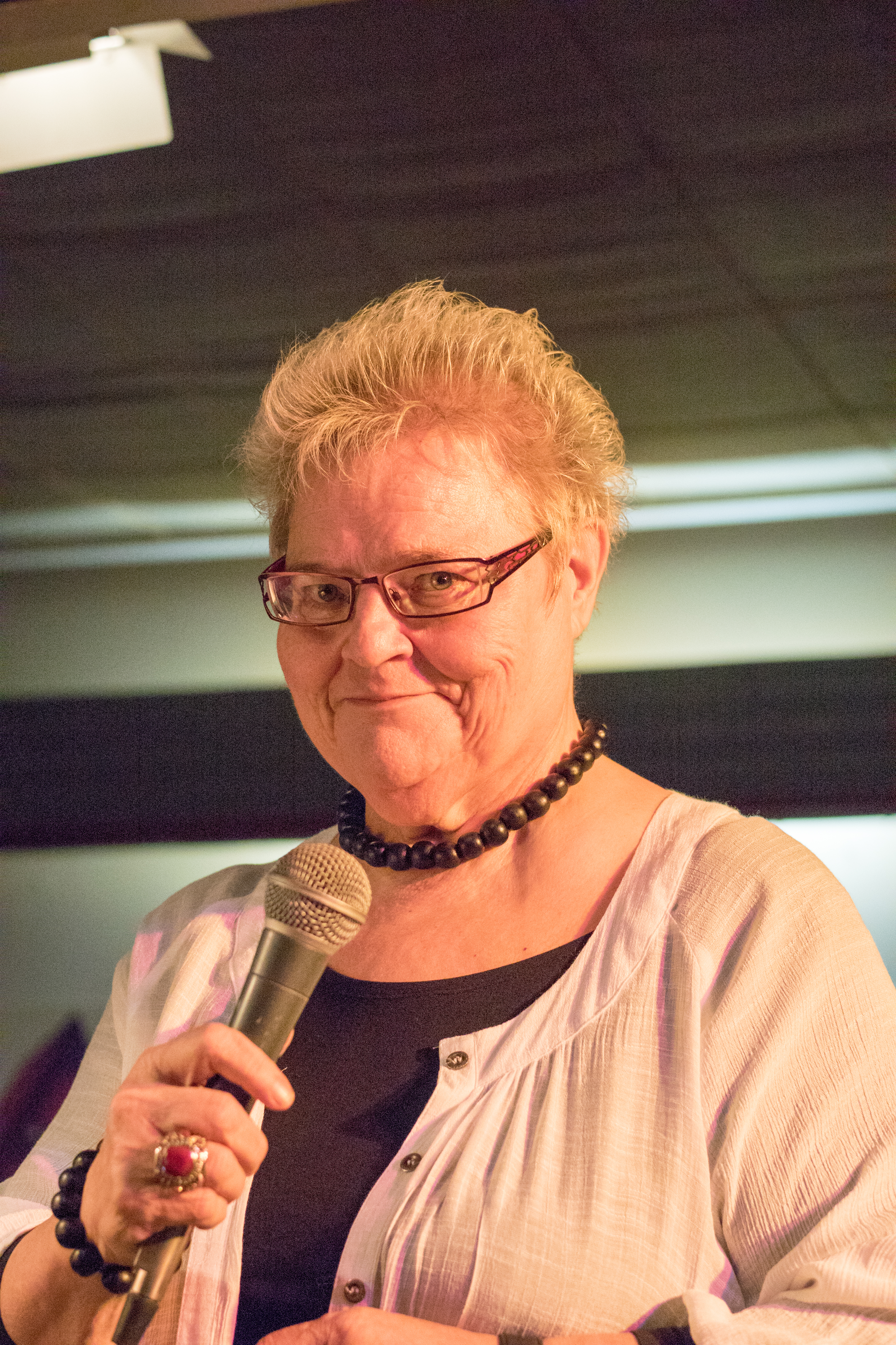 Arja Havakka suomalainen laulaja